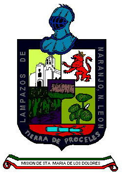 Lampazos, Mexico Seal